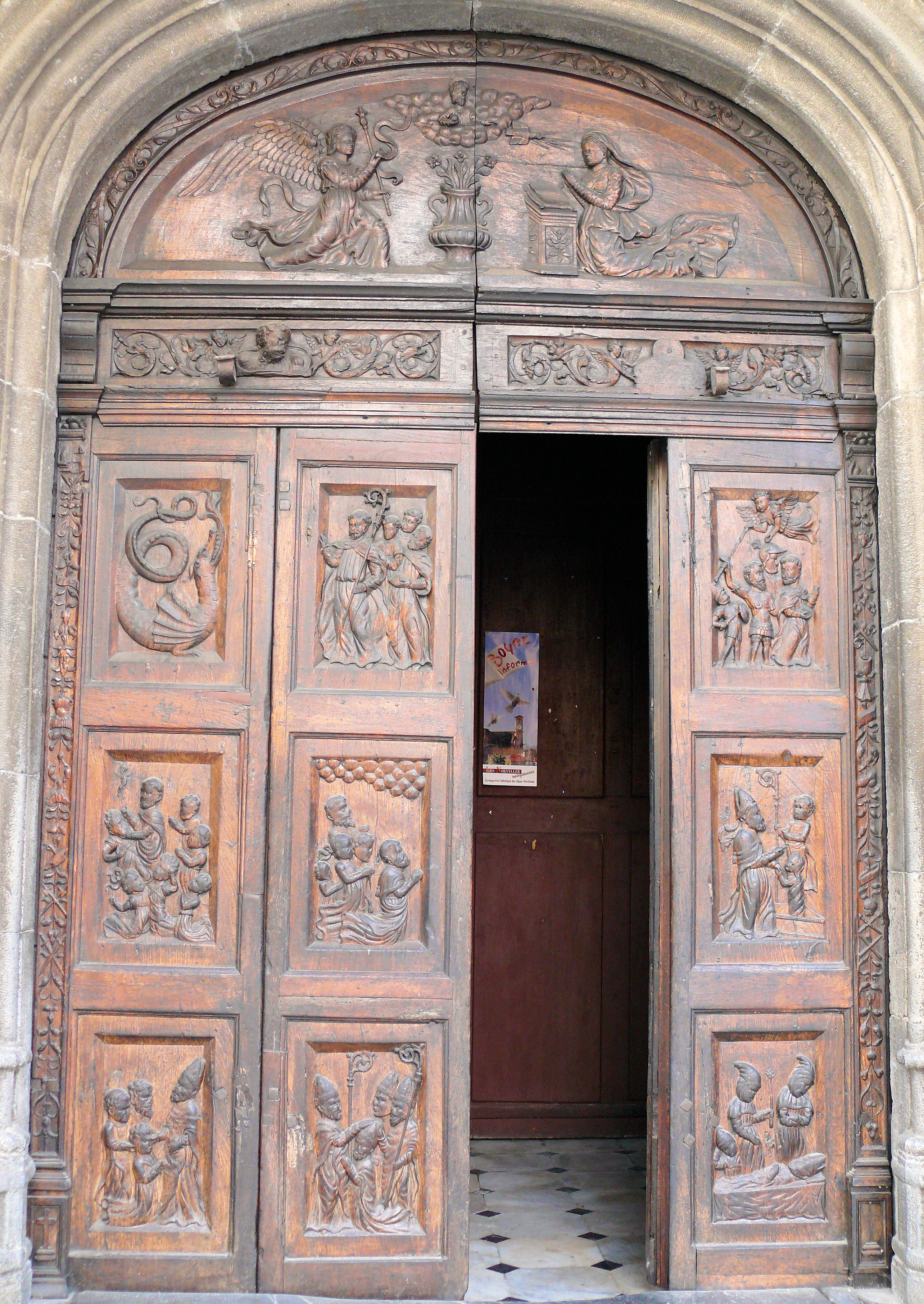 Utelle - Église Saint-Véran - Vantaux de porte datant de 1542 représentant 12 vies de saint Véran